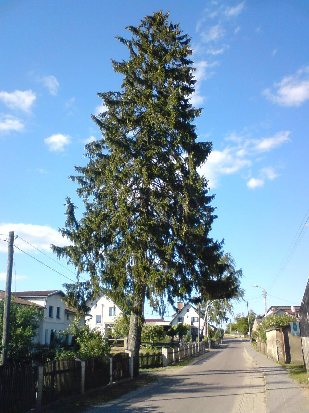 Świerk w centrum Samina - ikona tejże wsi.